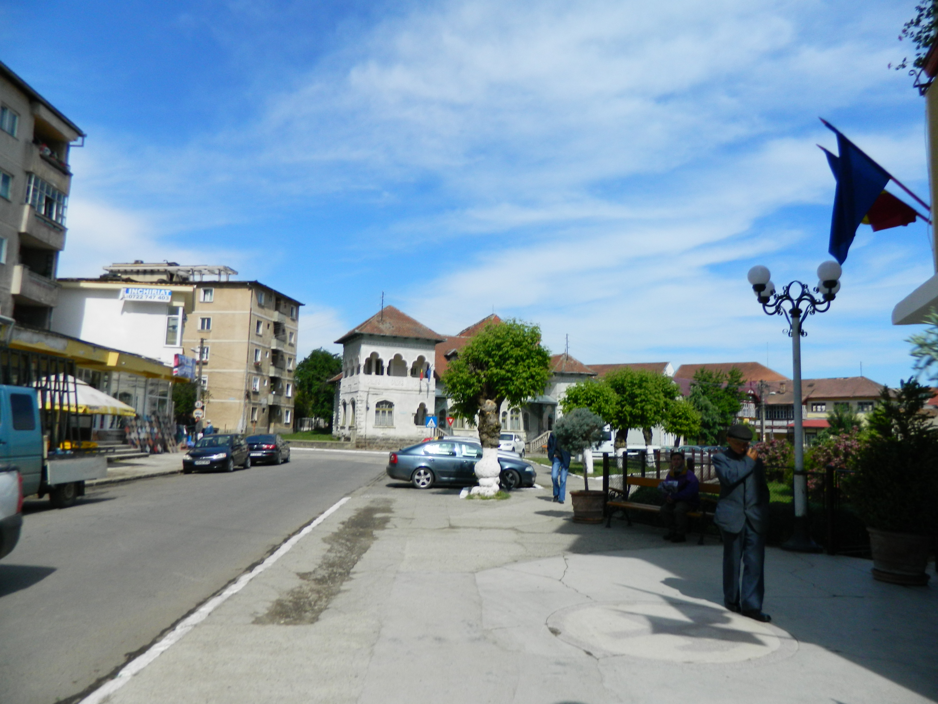 Centrul istoric al orașului municipiul Brad